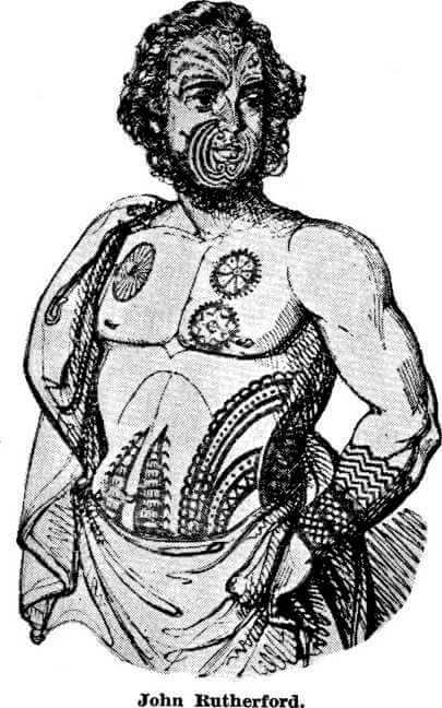 Джон Рутерфорд с маорийской татуировкой. Рис. из книги Дж. Л. Крэйка 1828 г.